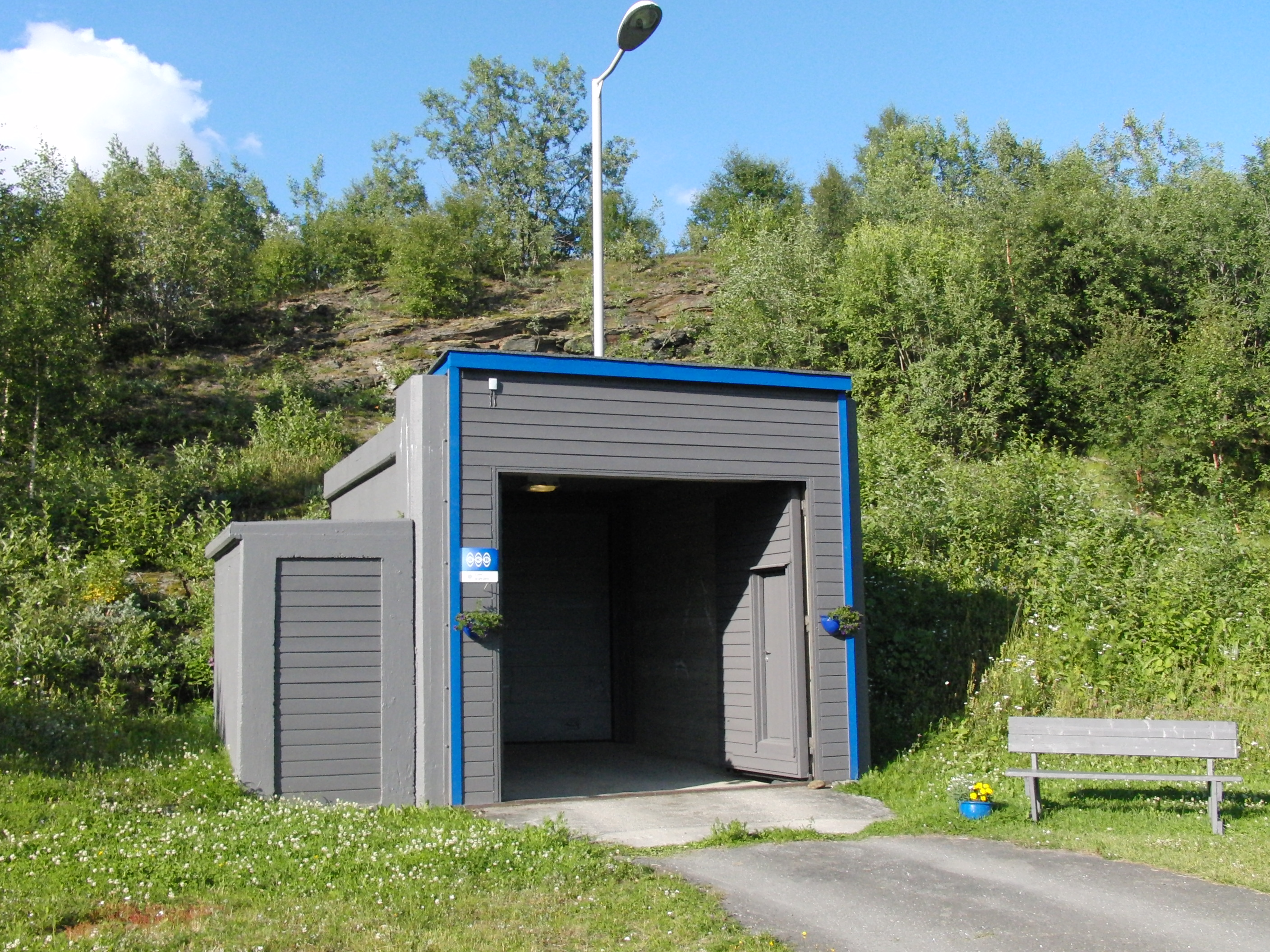 Lomi kraftverk